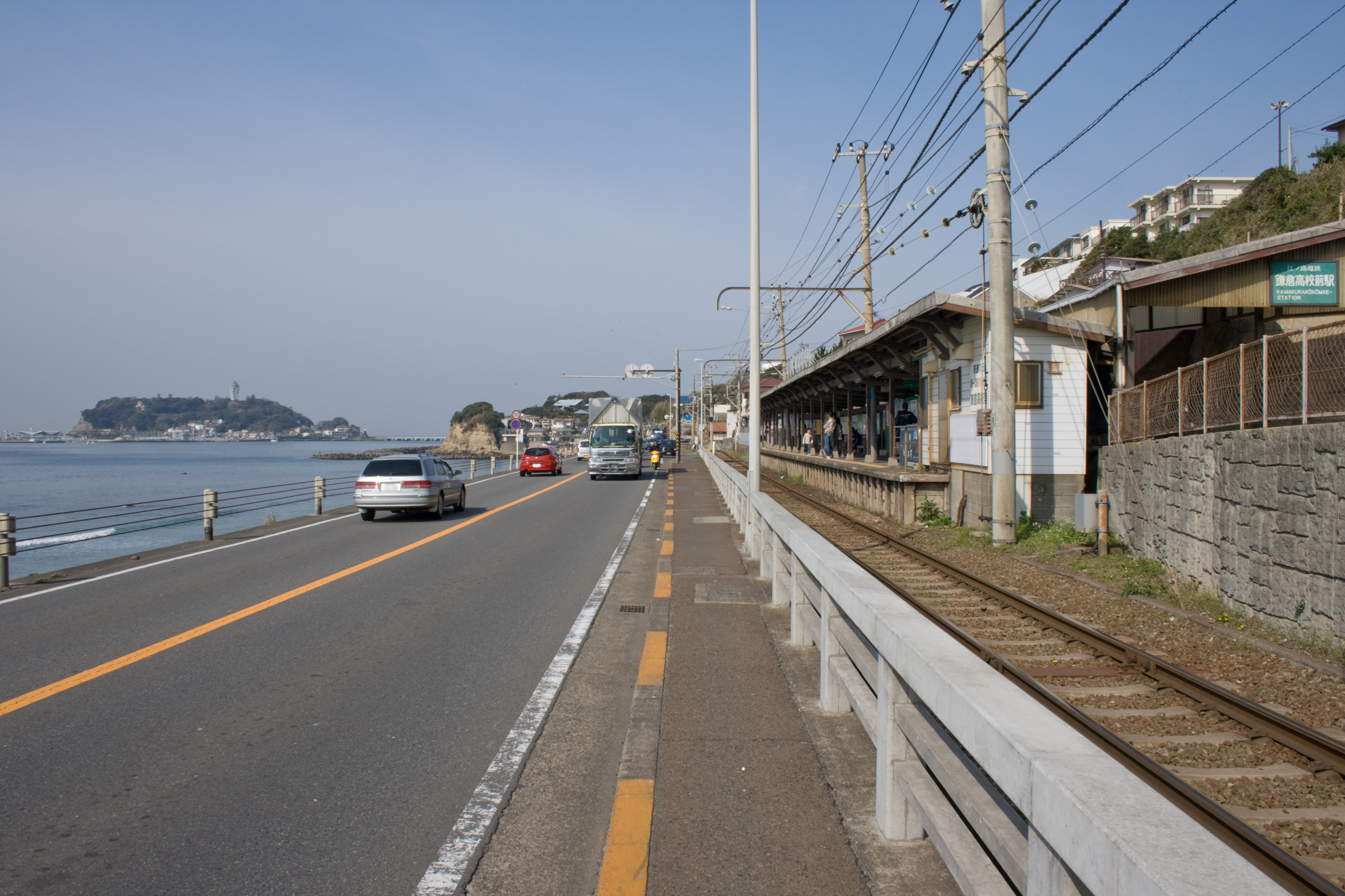 江ノ島電鉄 鎌倉高校前駅